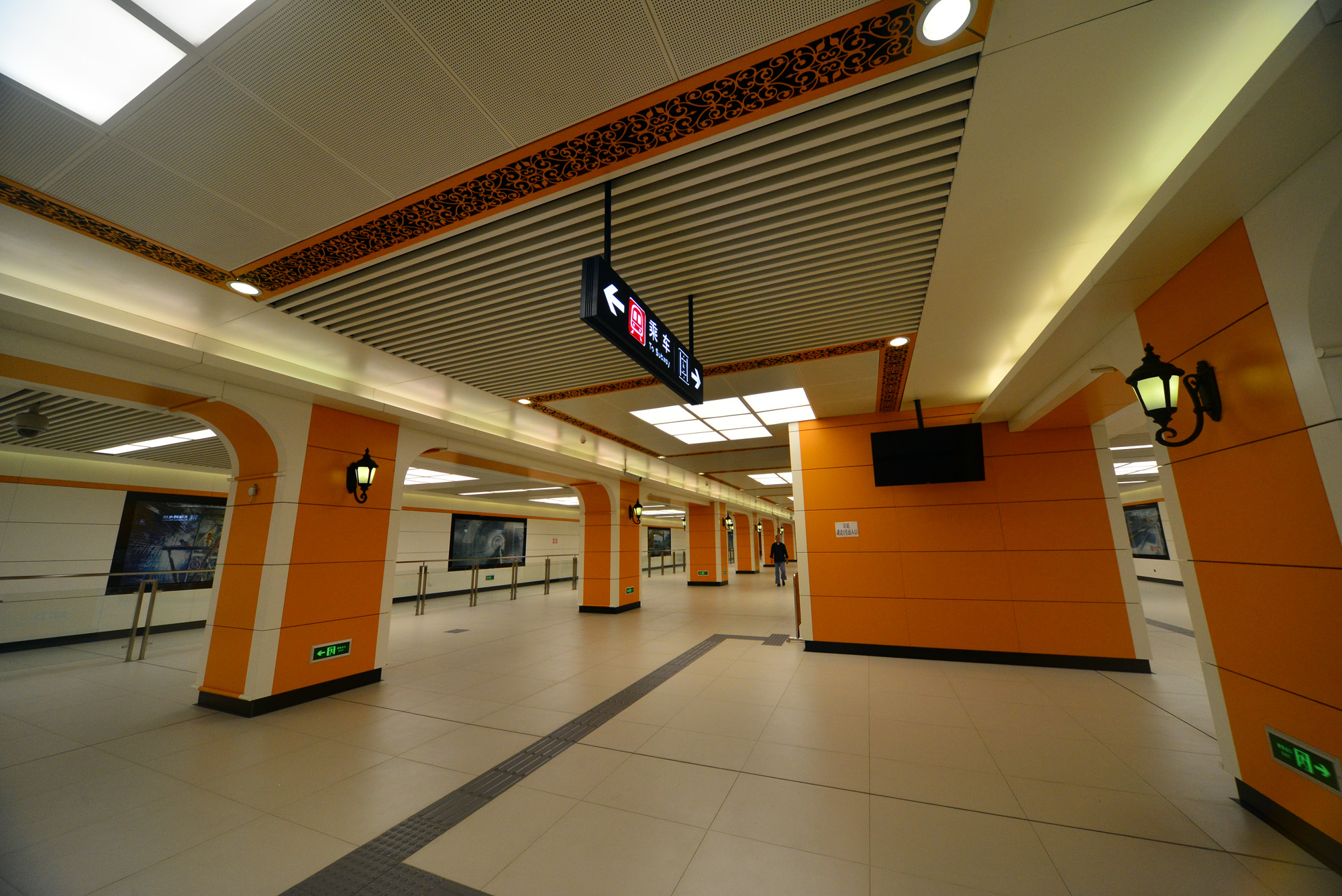 巡道工出品 photo by Xundaogong医大二院站厅层